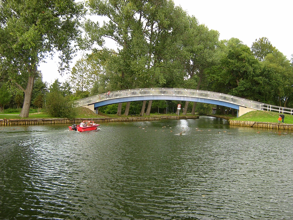 Beginn des Oberbaches am Tollensesee in Neubrandenburg. Der Oberbach ist ein mittelalterlicher Kanal, der gebaut wurde um die Vierrademühle in Neubrandenburg betreiben zu können. Zusammen mit dem Ölmühlenbach bildet er den Oberlauf der Tollense. Diese Brücke wurde erst in den 1970er-Jahren gebaut. Das vorhergehende Bauwerk war aus Holz und mit Treppen im Stil einer Spreewaldbrücke errichtet. Sie war weiß gestrichen.